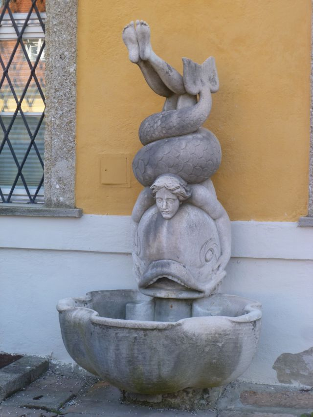 Frohnburg_-_Delphinbrunnen